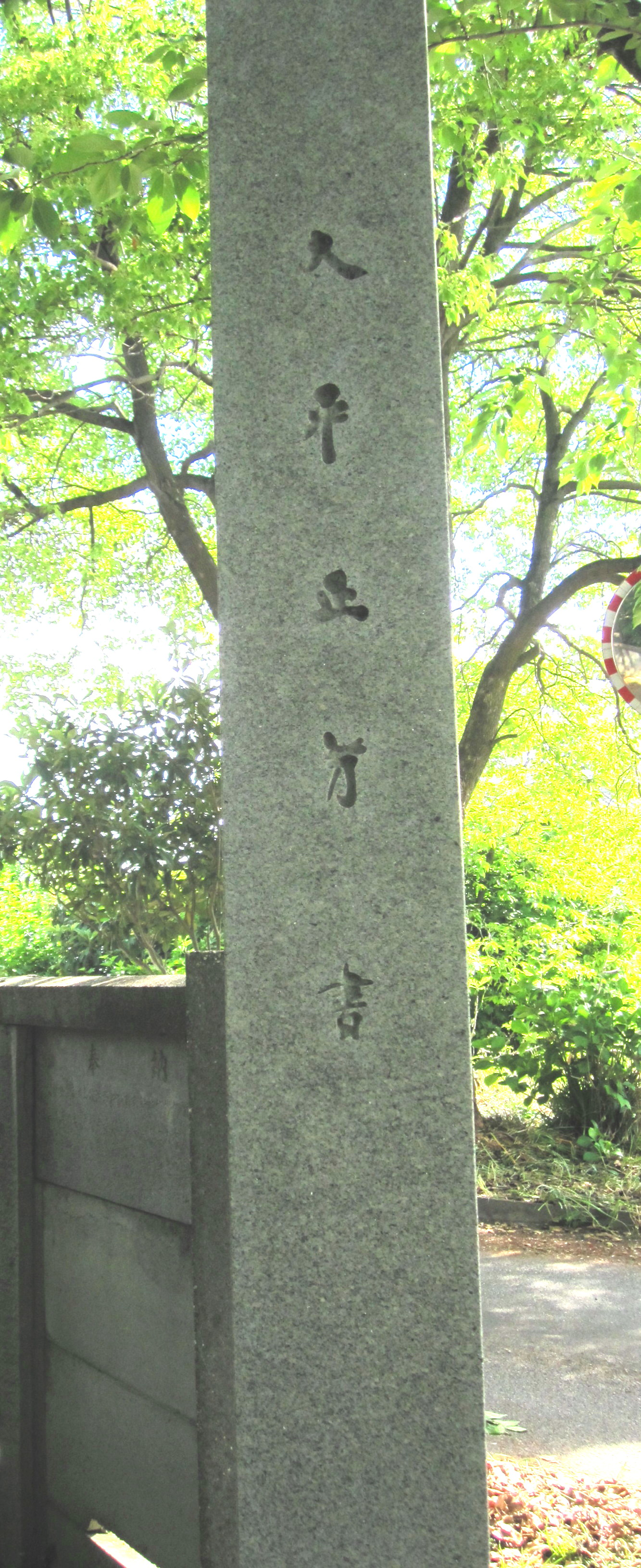 白山公園にて保存用資料として撮影